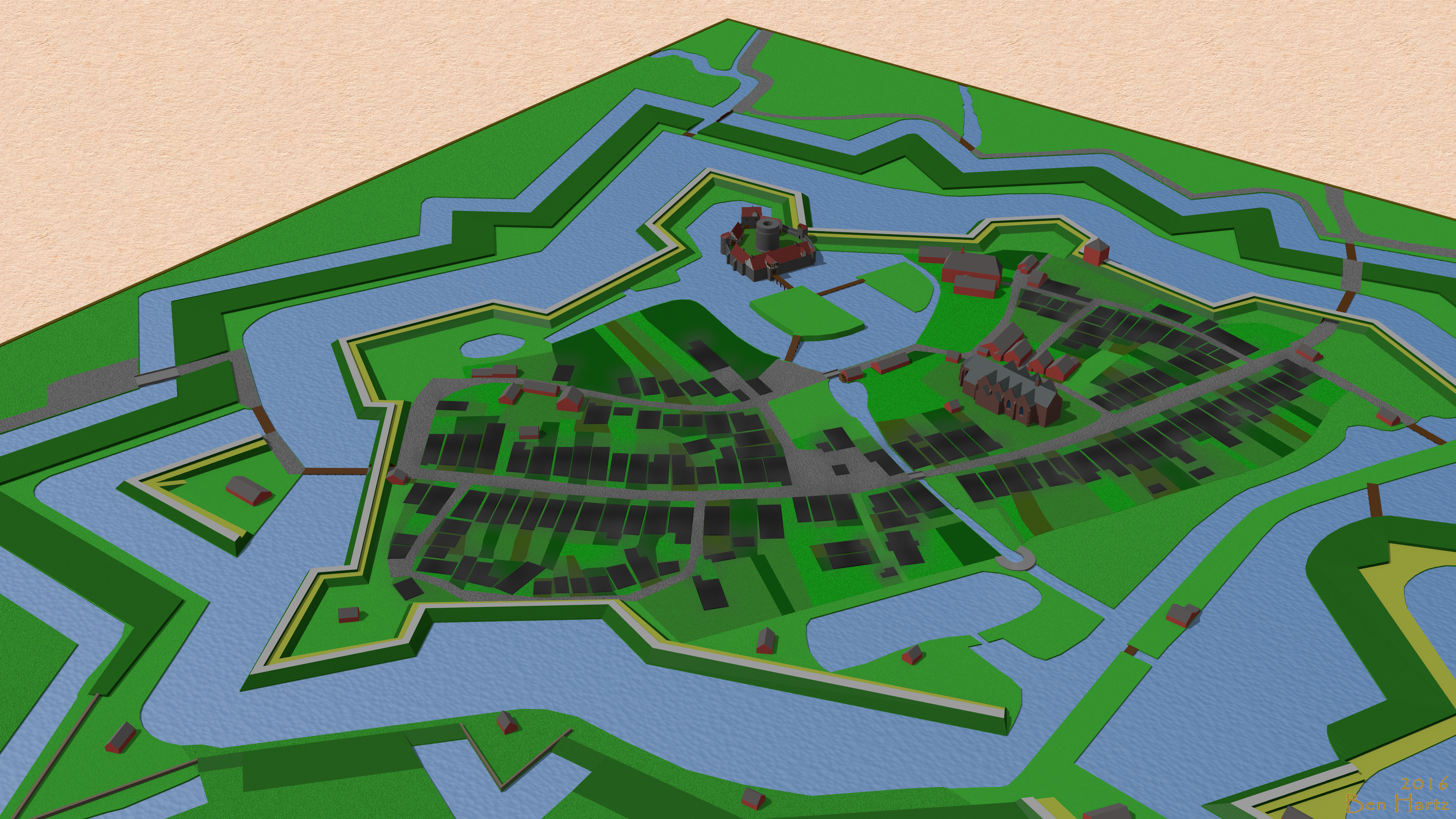 Darstellung der abgebrannten Stadt Vechta 1684. Am 8. August 1684 löste ein Feuer in einer Schmiede in der heutigen Juttastraße einen verheerenden Stadtbrand aus. Das Modell zeigt die abgebrannten Häuser und das Ausmaß des Schadens. (Modellvorlage ist der 1685 erstellte Plan mit den Brandschäden.)